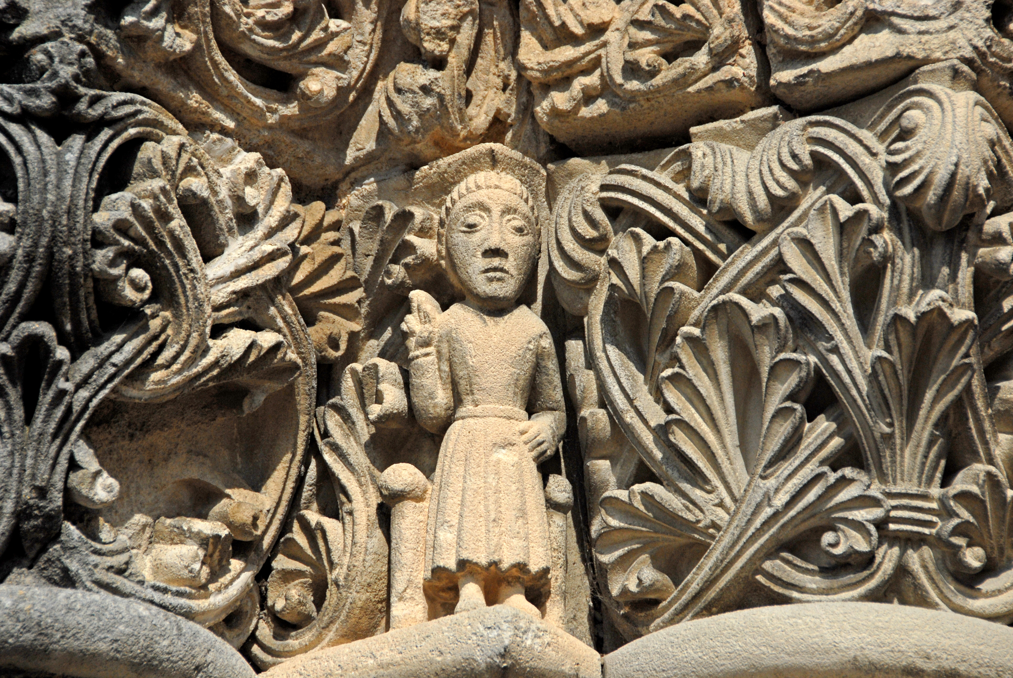 Genzac-la-Pallue, Kapitelle. Hauptportal links